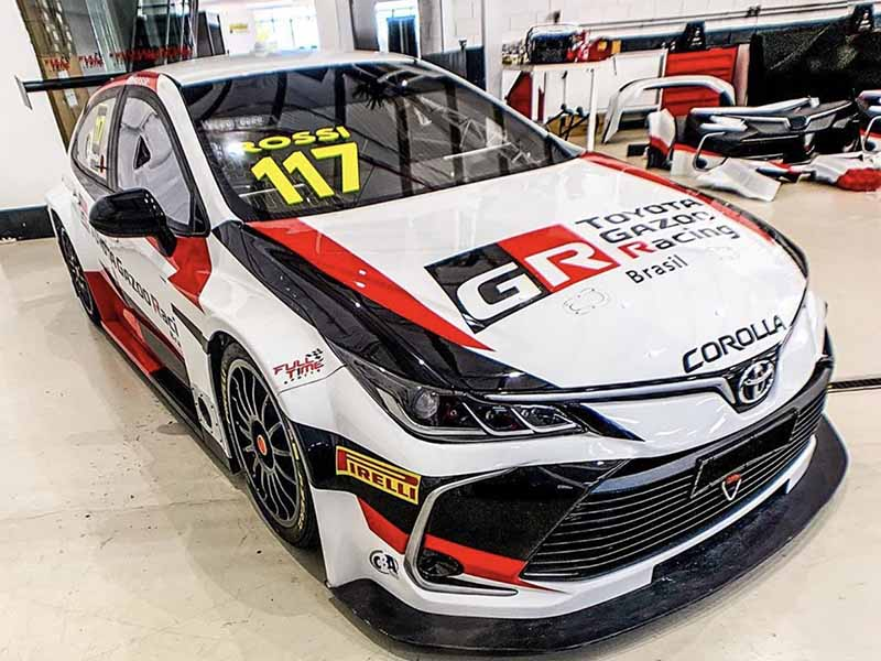 auto de carreras